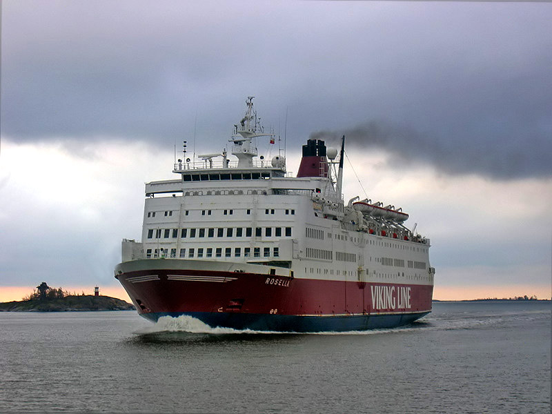 M/S Rosella arriving in Helsinki in autumn 2007.